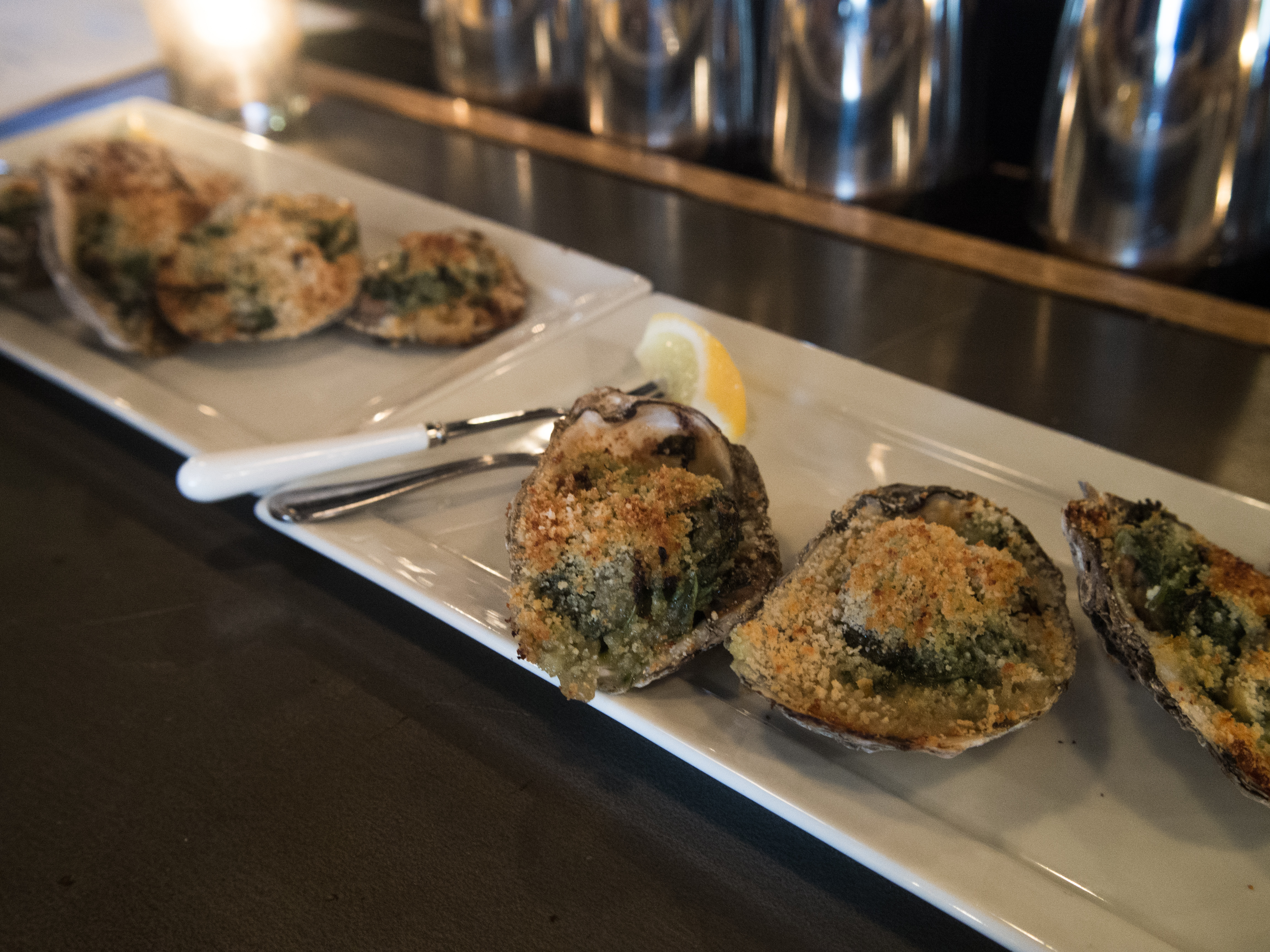 SOHO - Pig in a Blanket, Oysters Rockefeller